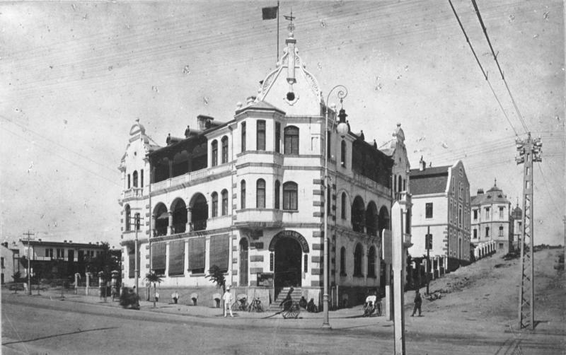 Tsingtau, Gebäude der Hamburg-Amerika-Linie China, Tsingtau.- Gebäude der Hamburg-Amerika-Linie Information added by Wikimedia users.